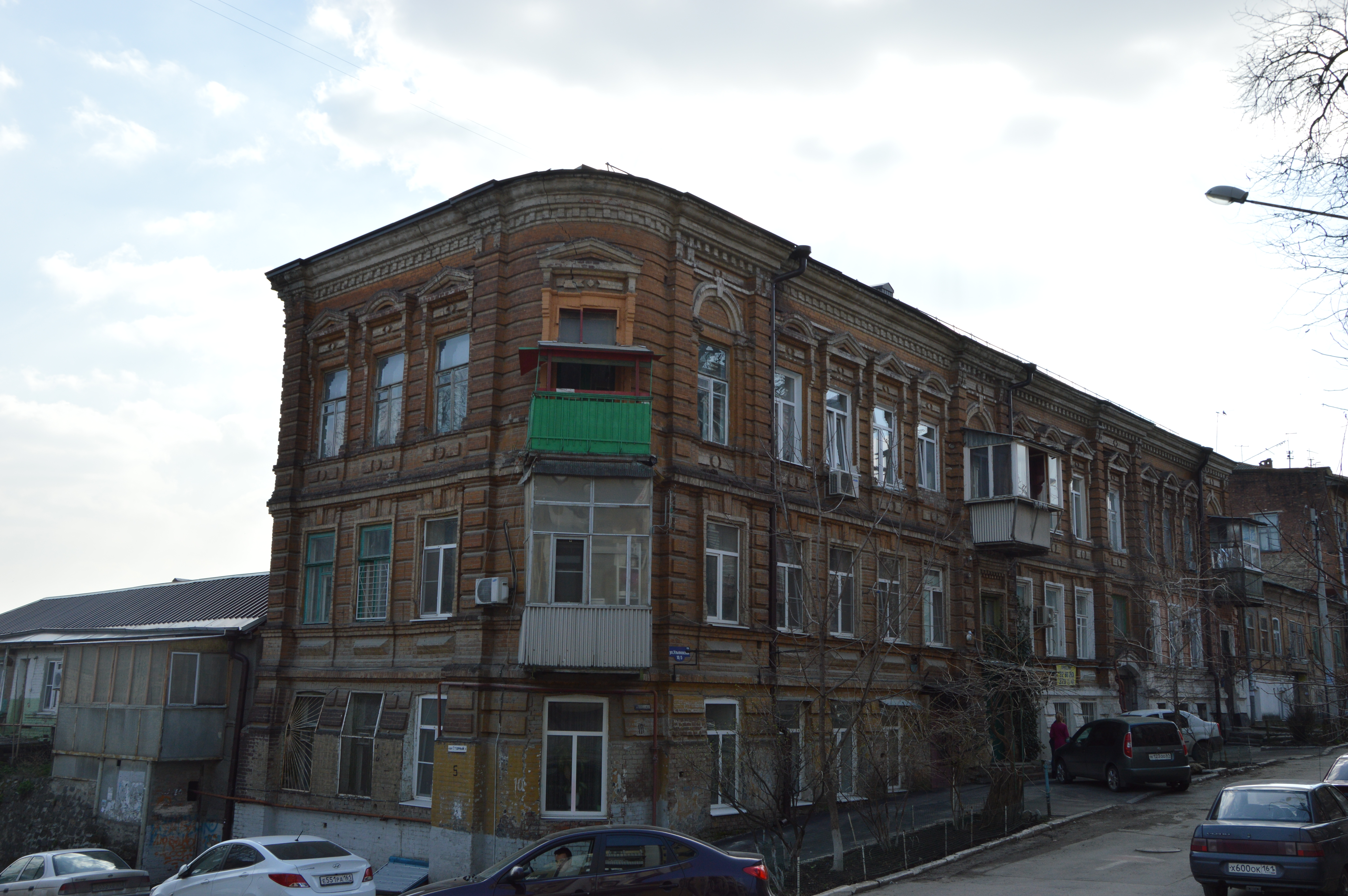 Одно из зданий Ростова-на-Дону